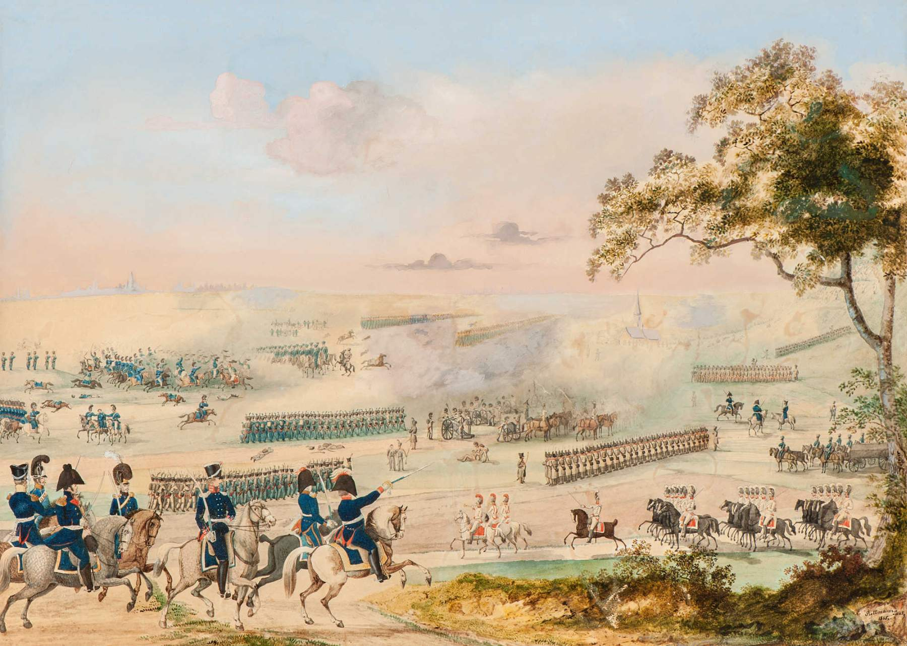 Bataille de Handschuhsheim, 24 septembre 1795.